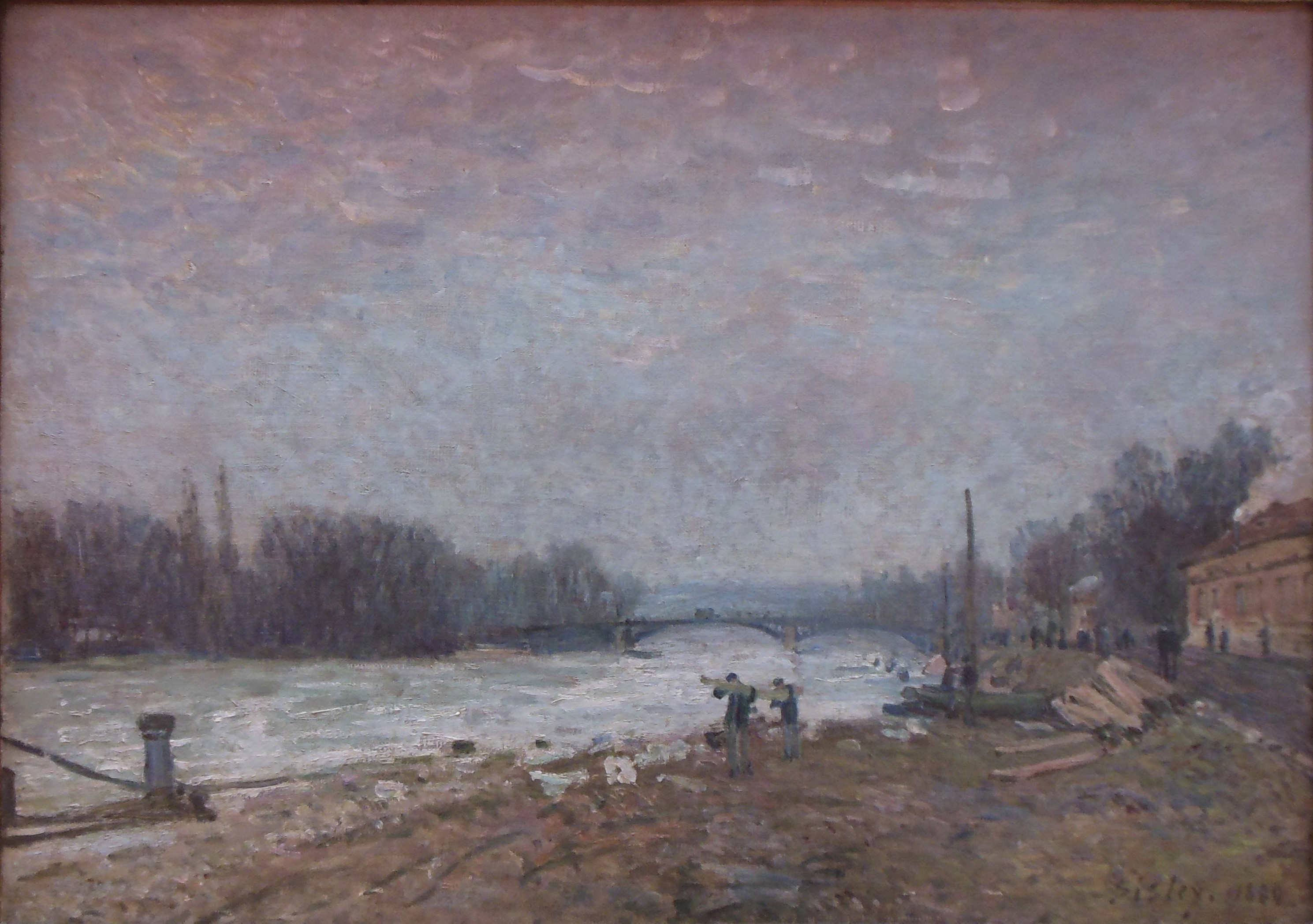 Après la débâcle, la Seine au pont de Suresnes.title QS:P1476,fr:"Après la débâcle, la Seine au pont de Suresnes." label QS:Lfr,"Après la débâcle, la Seine au pont de Suresnes."